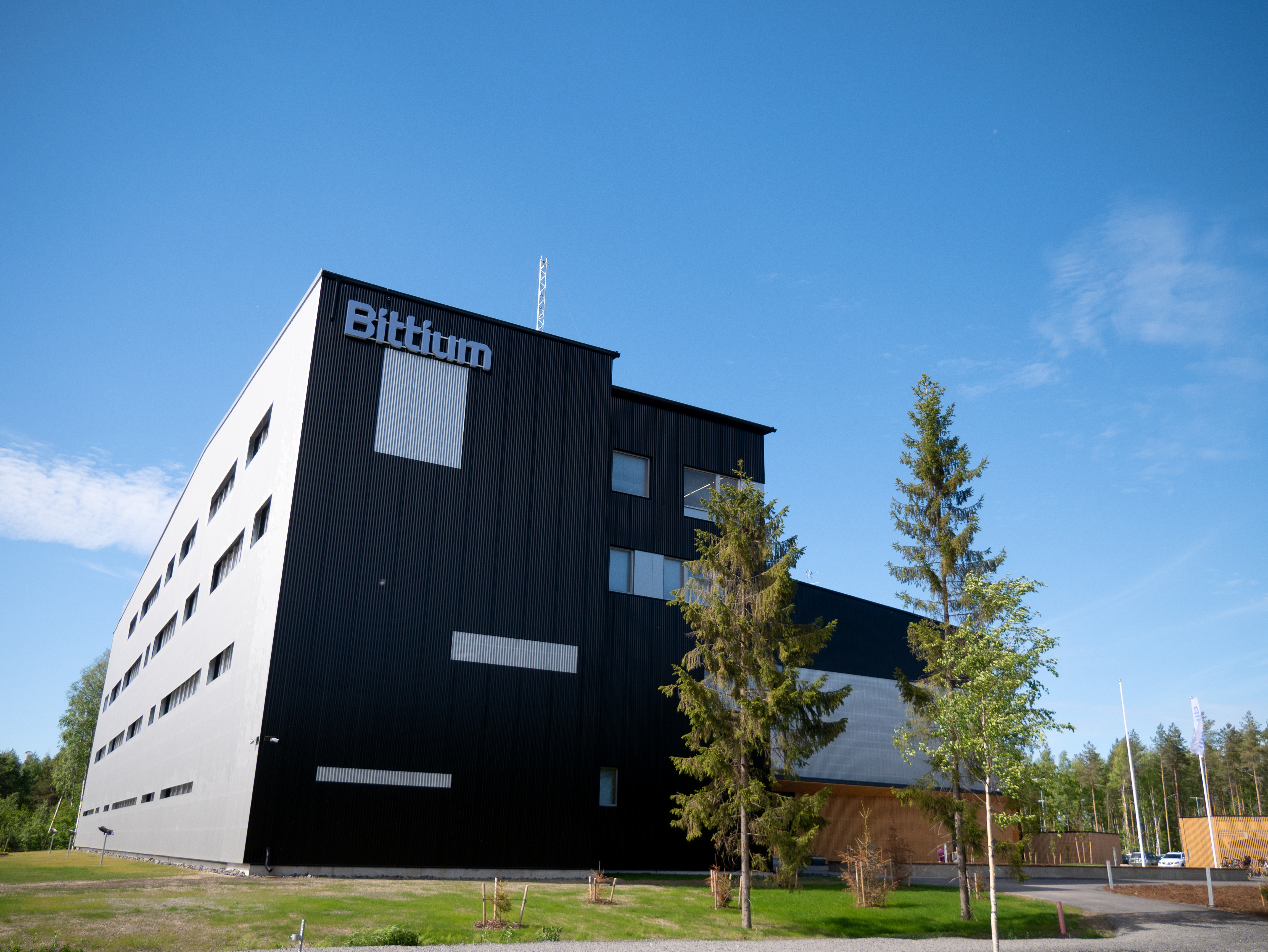 Bittiumin pääkonttori Oulussa.